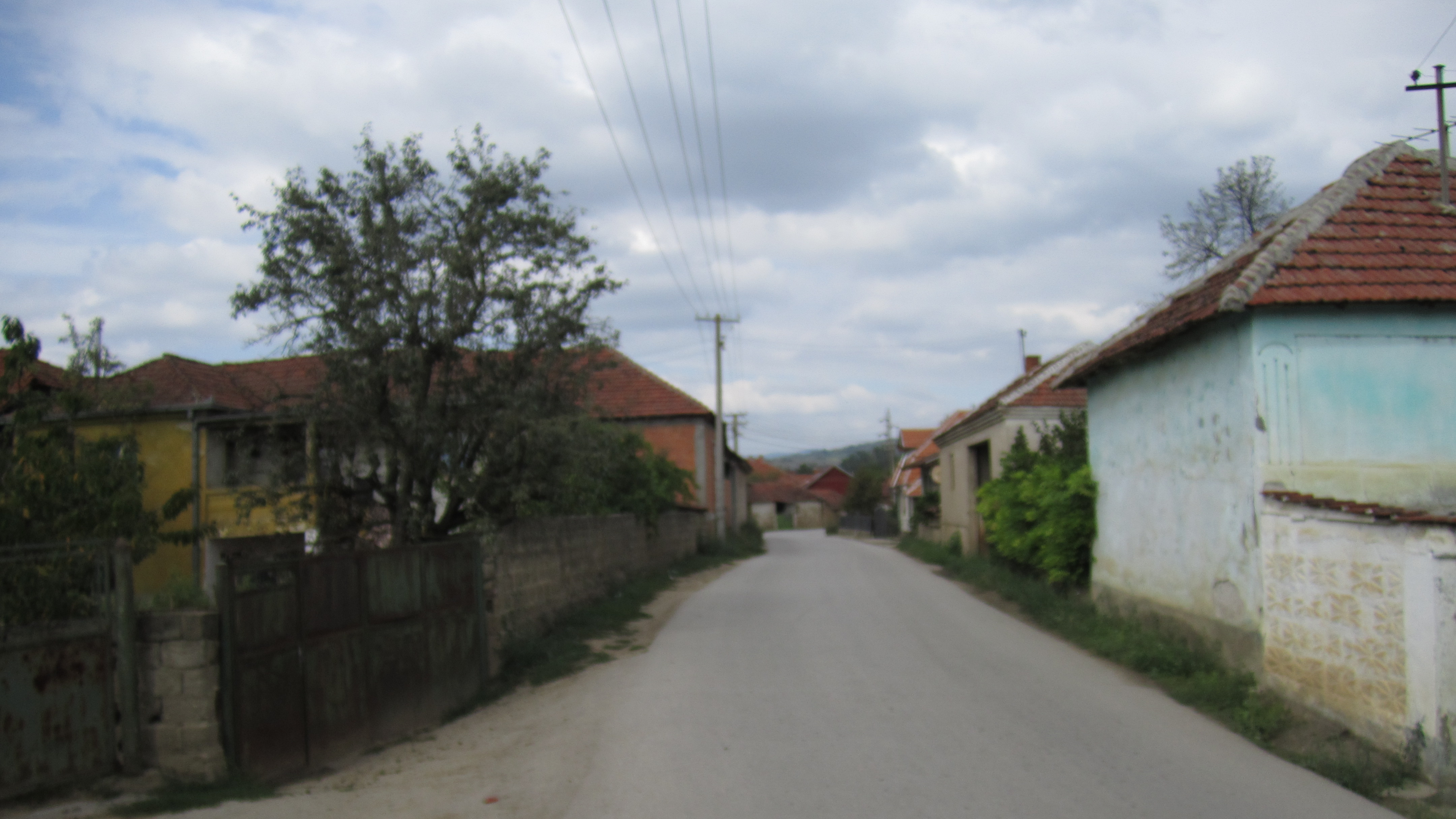 Srpski (latinica): Razgojnski Čifluk, Leskovac